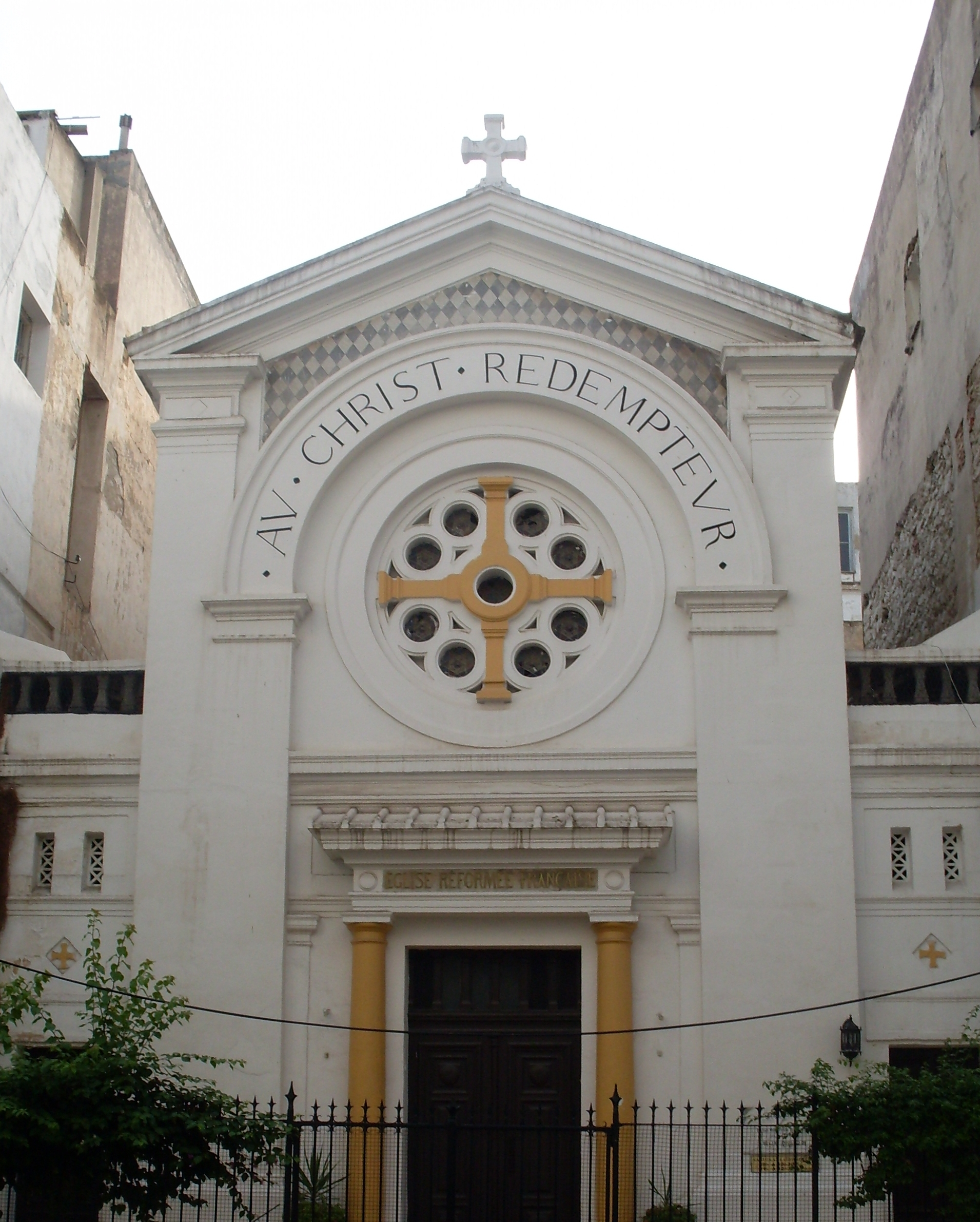 Eglise Réformée Française, 36, rue Charles de Gaule.